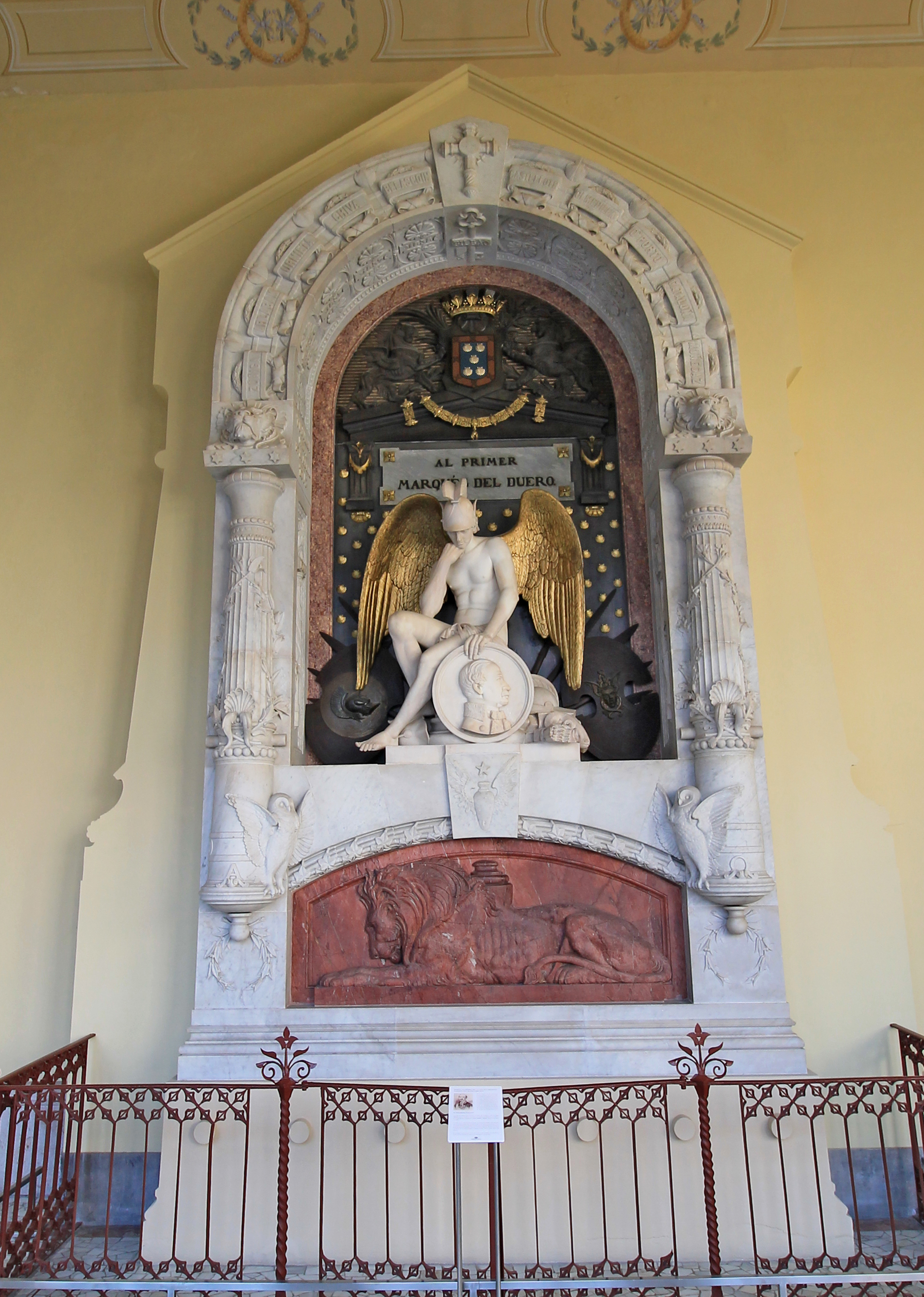 Mausoleum of Manuel Gutiérrez de la Concha.